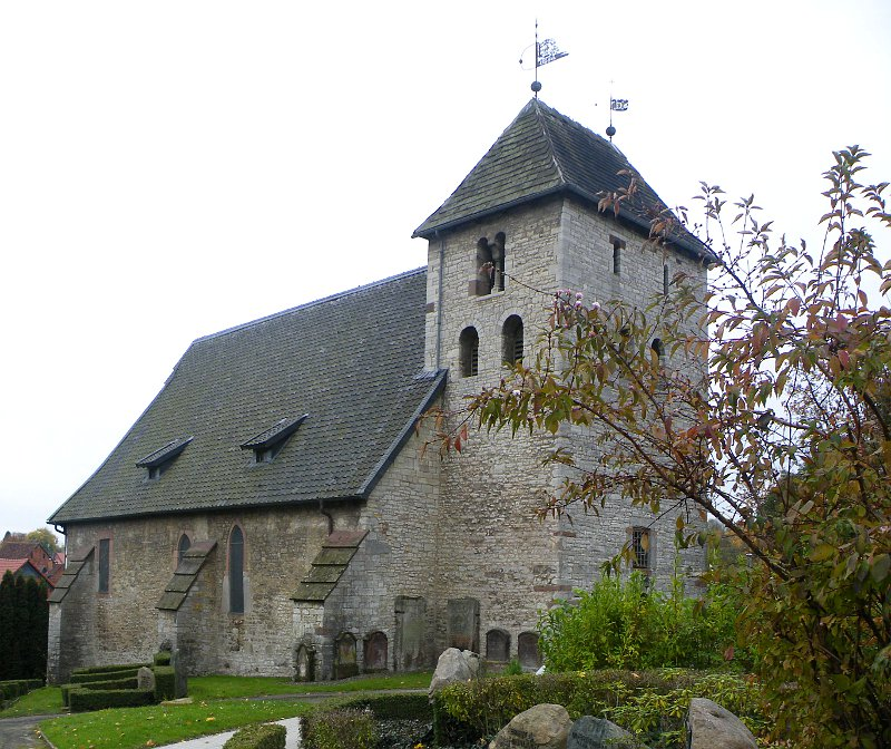 Blick auf die St. Georgskirche von Norden